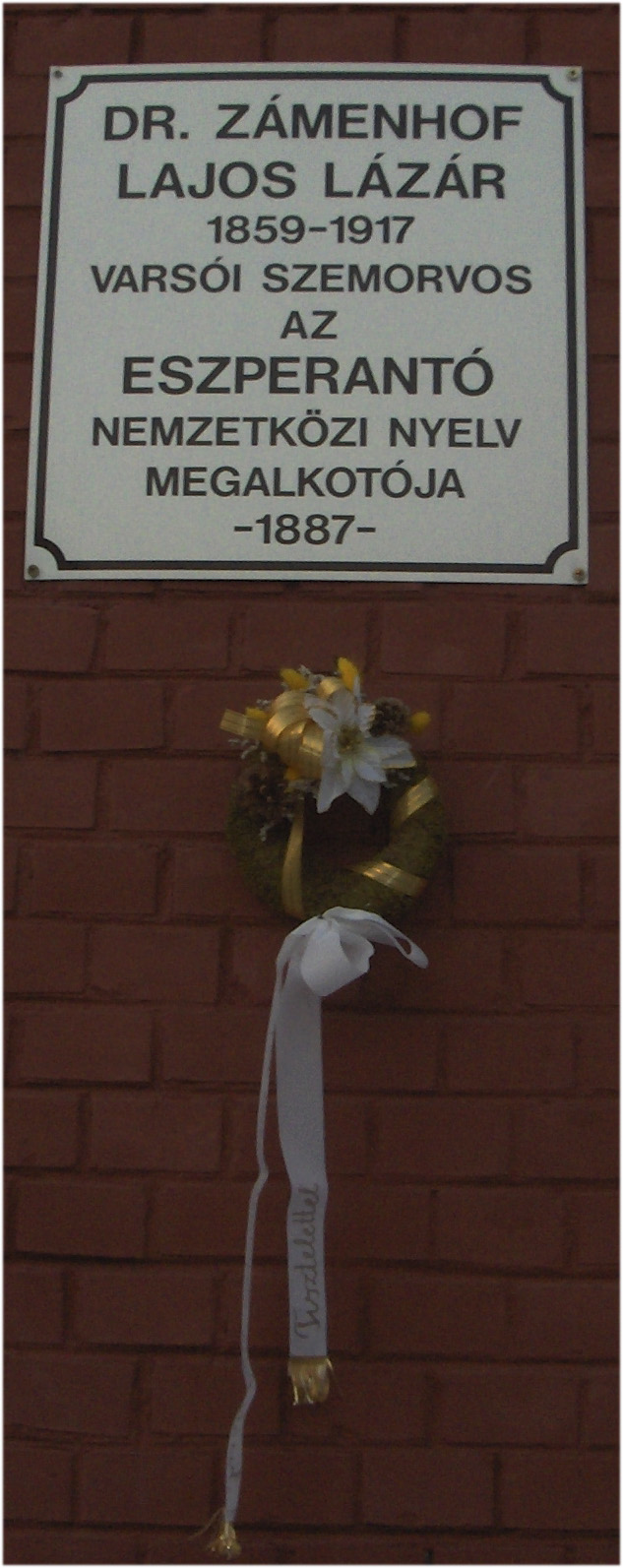 2a memortabulo en Miskolc.